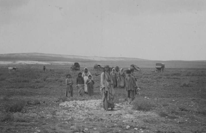 Крымские цыгане 1897 окрестности Карасубазара Anton Stuxberg